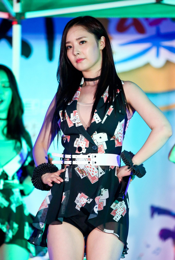 (15.07.18) 보령 도심속 썸머 페스티벌 직찍 ( 달샤벳 세리 아영 우희 가은 )